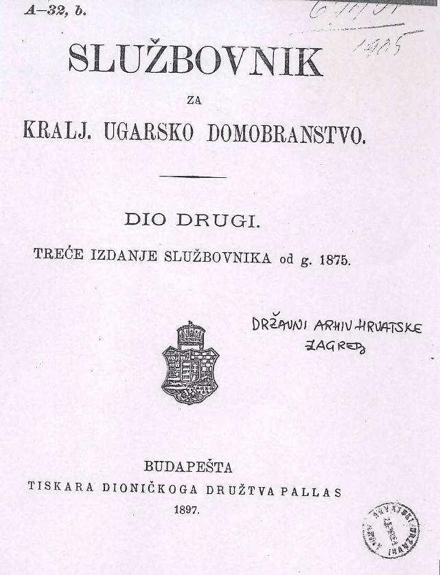 Službovnik za kraljevsko ugarsko domobranstvo, Dio drugi., Budimpešta 1897